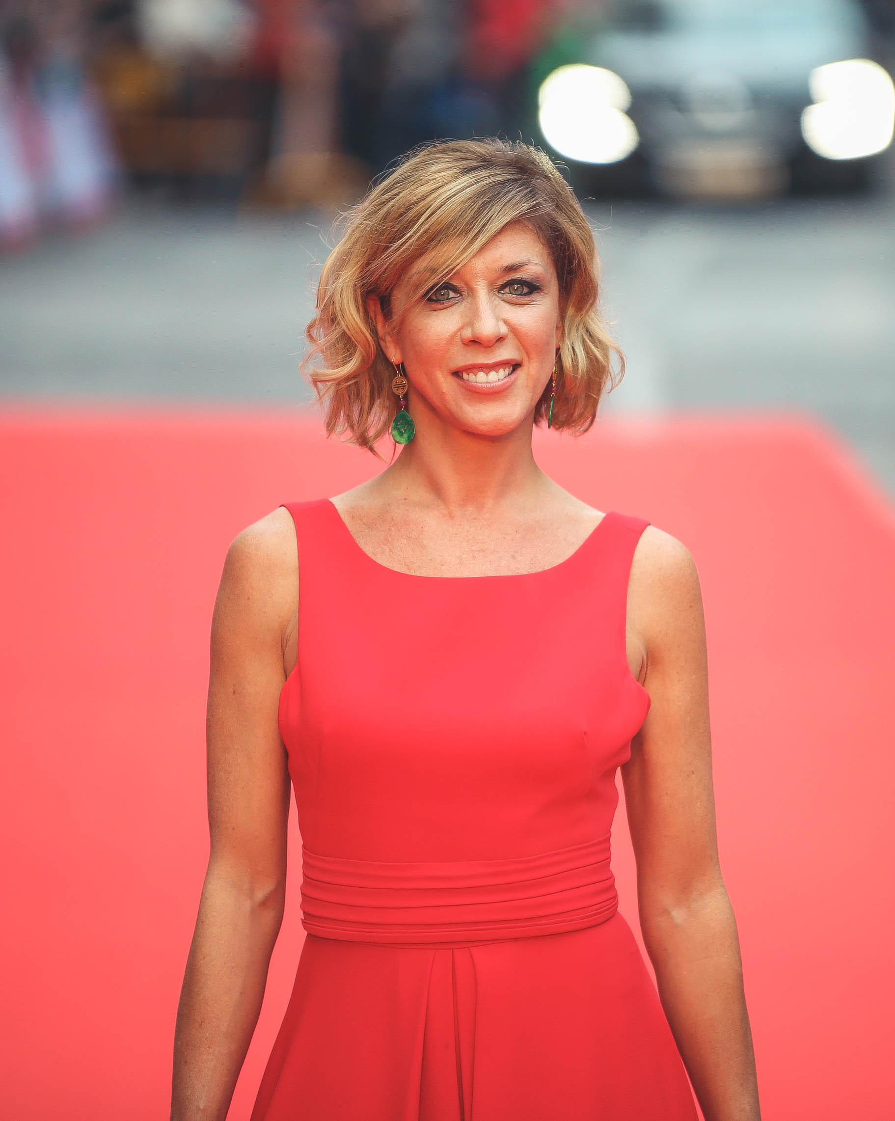 Seminci 2016